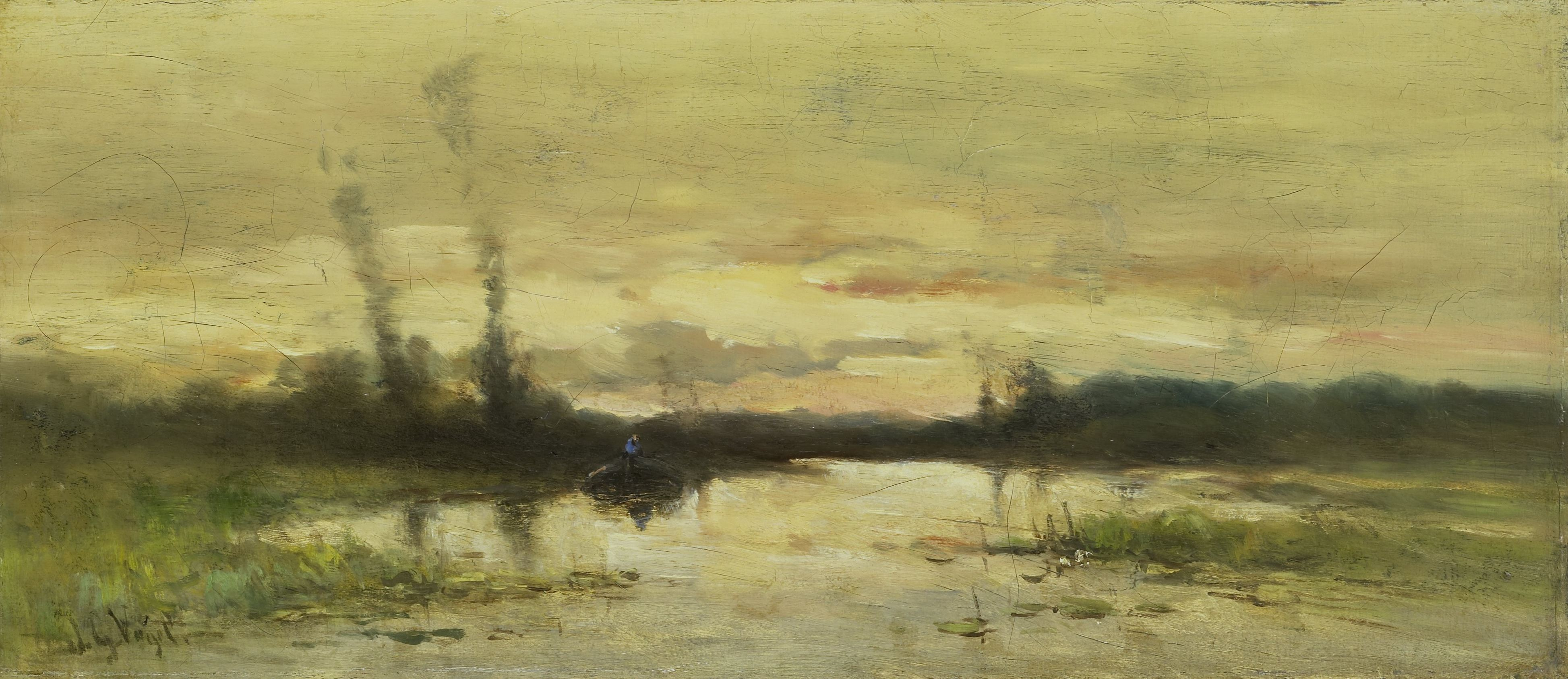 Landschap aan de vaart bij Hilversum. Moeraslandschap met een bootje op het water, op de voorgrond waterlelies.